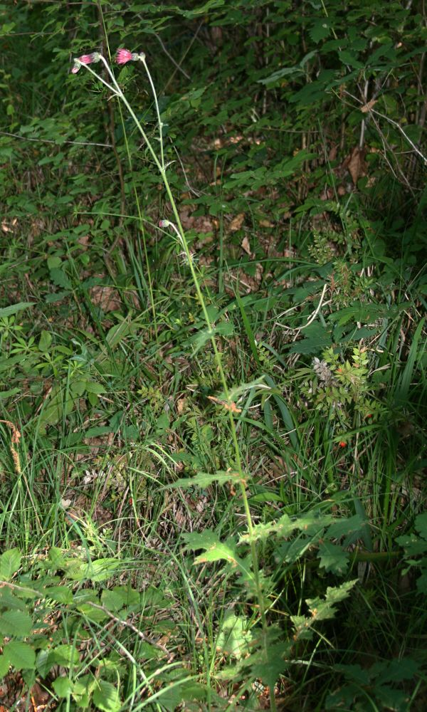 Cirsium hypoleucum, Korbblütler (Asteraceae) - Türkei/Türkiye/Turkey: Düzce Prov./Düzce ili, NW Kalkın W Akçakoca, Eichen-Mischwald